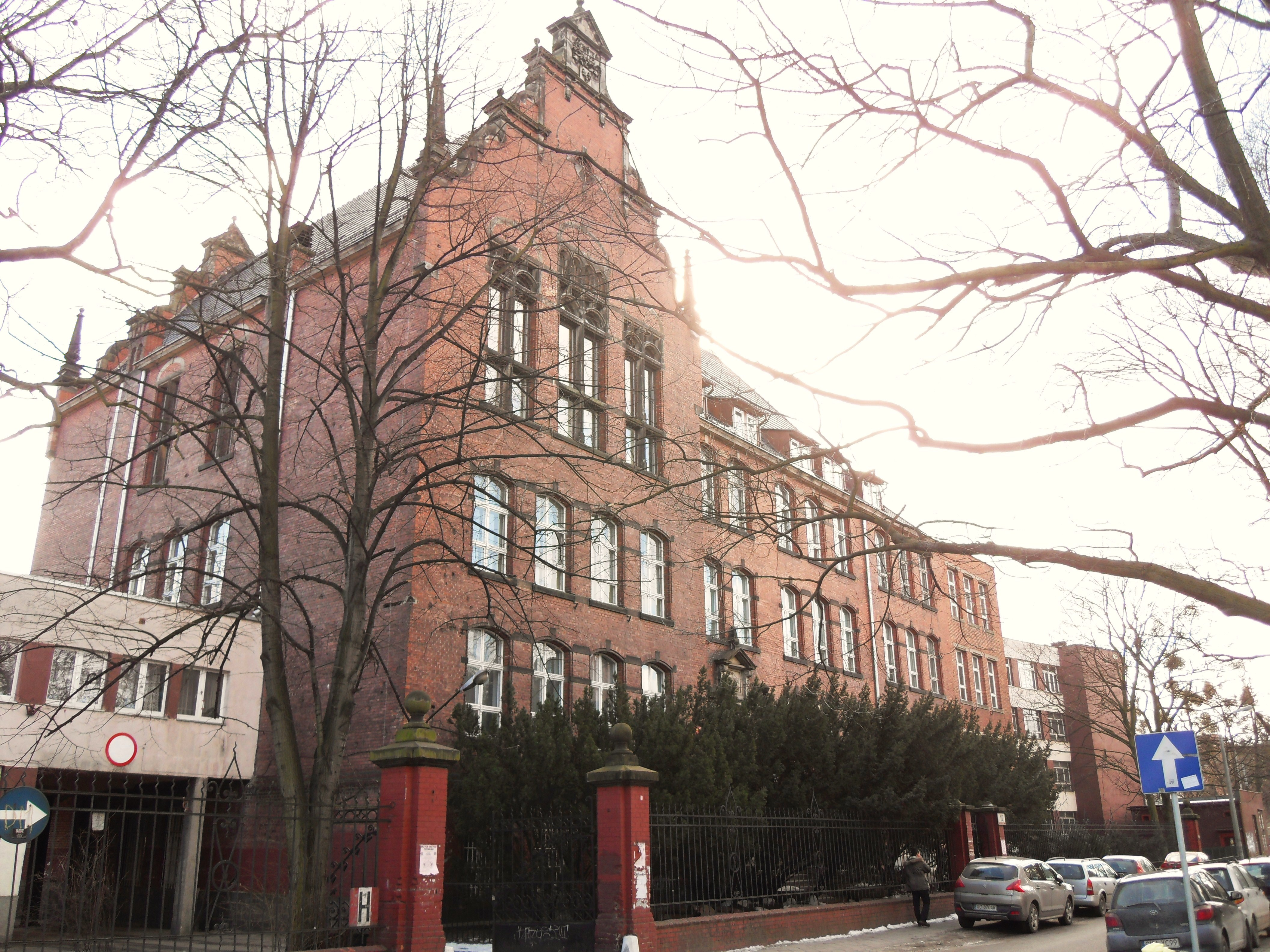 Gdańsk Wrzeszcz, szkoła Conradinum - zabytkowa część gmachu, zbudowana w latach 1898-1900.